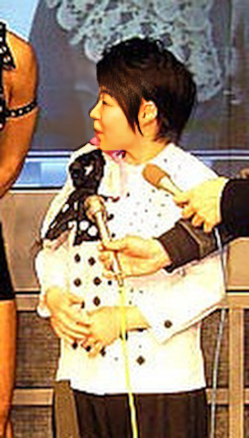 Hanako Yamada in 2006